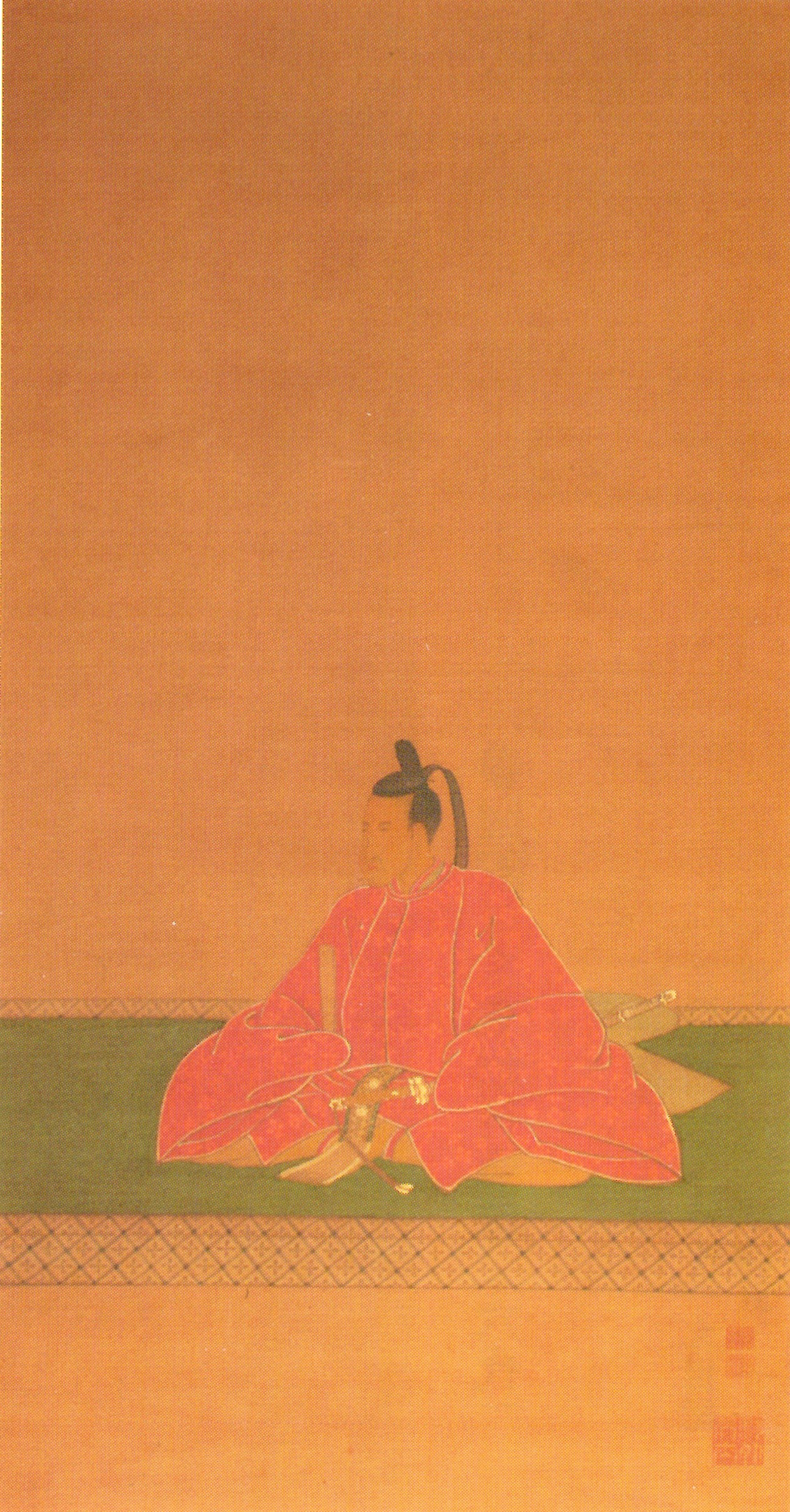 本多政通の肖像。